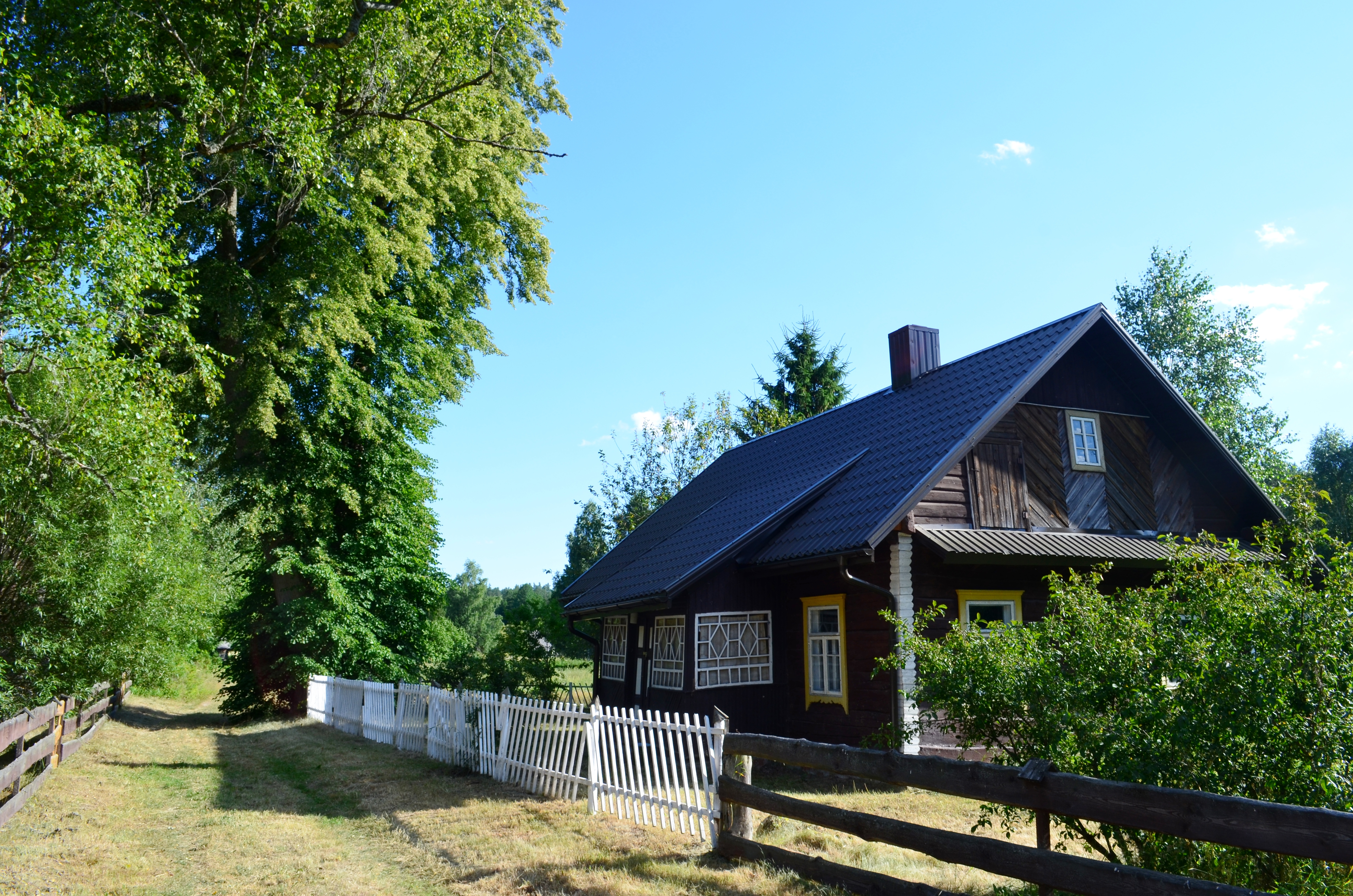 Rudnelė, G. Didelytės namas, Varėnos r.